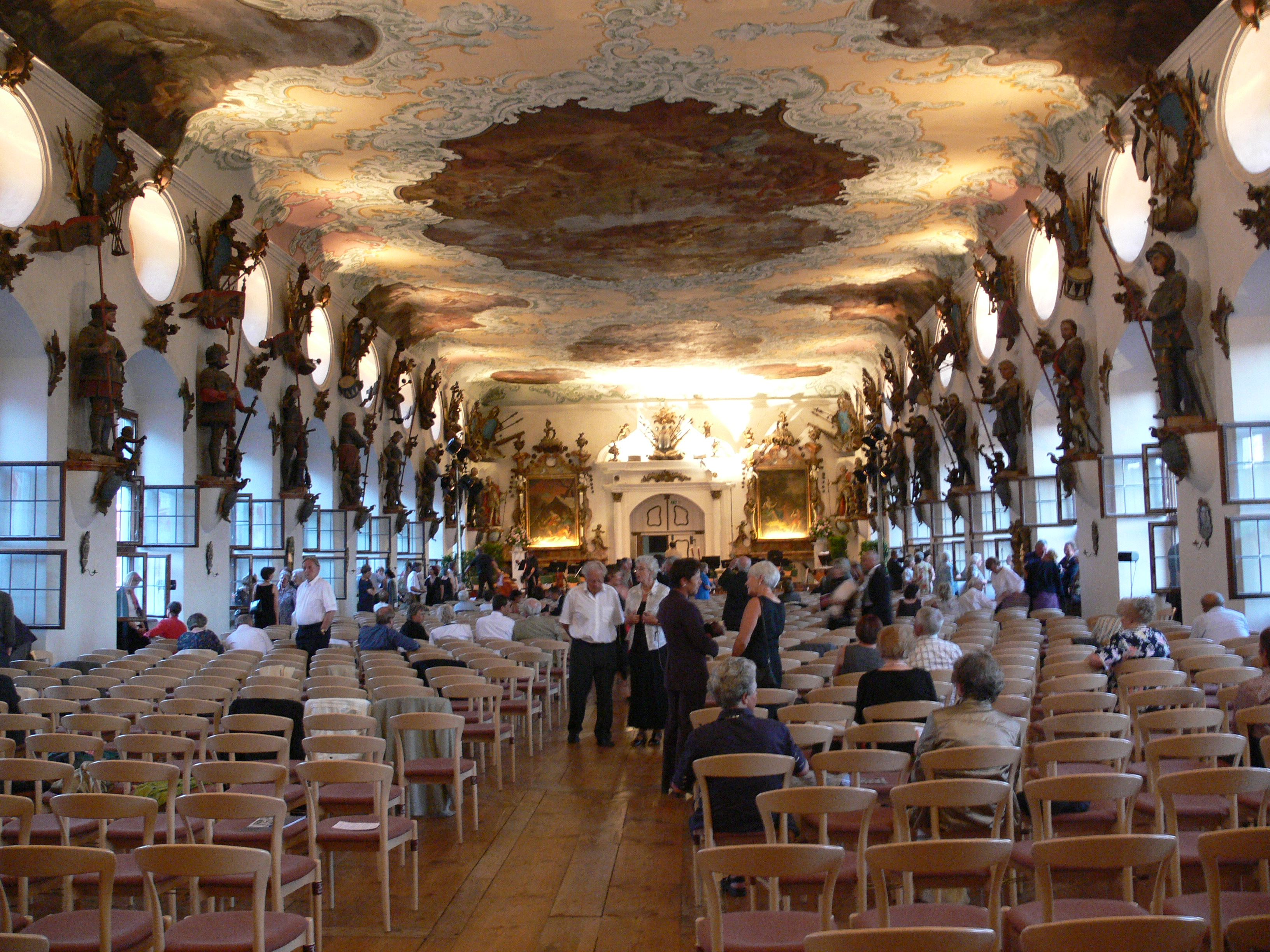 Schloss Wolfegg, Wolfegg, Landkreis Ravensburg, Baden-Württemberg Rittersaal in einer Konzertpause